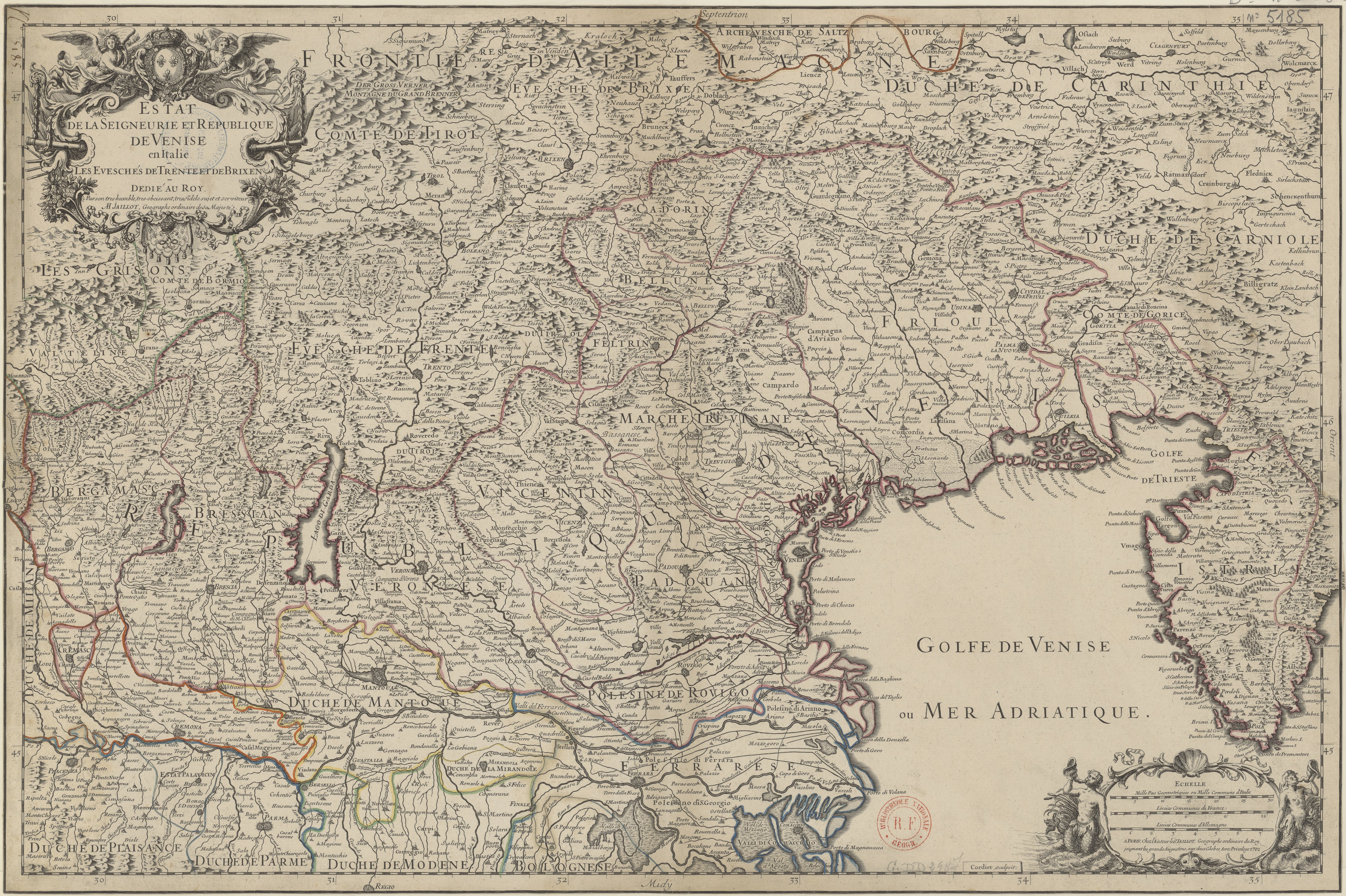 État de la seigneurie et république de Venise en Italie, les évêchés de Trente et de Brixen / dédié au roy par son très humble, très obéissant, très fidèle sujet et serviteur AH. Jaillot.